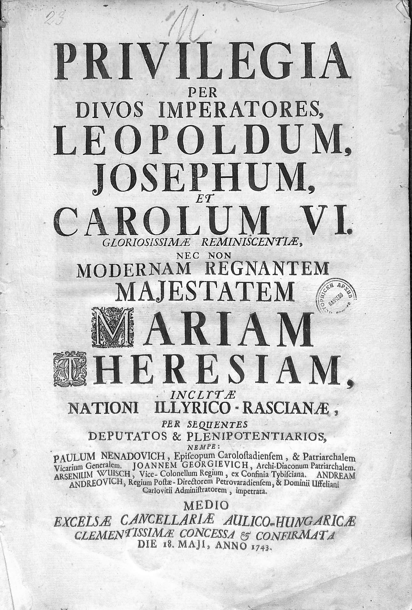 Privilegije Leoploda, Jozefa I i Karla VI date Ilirskoj deputaciji, a obnovljene od strane Marije Terezije. The privileges of Leopold, Joseph I and Charles VI were given to the Illyrian deputy, and restored by Maria Theresa